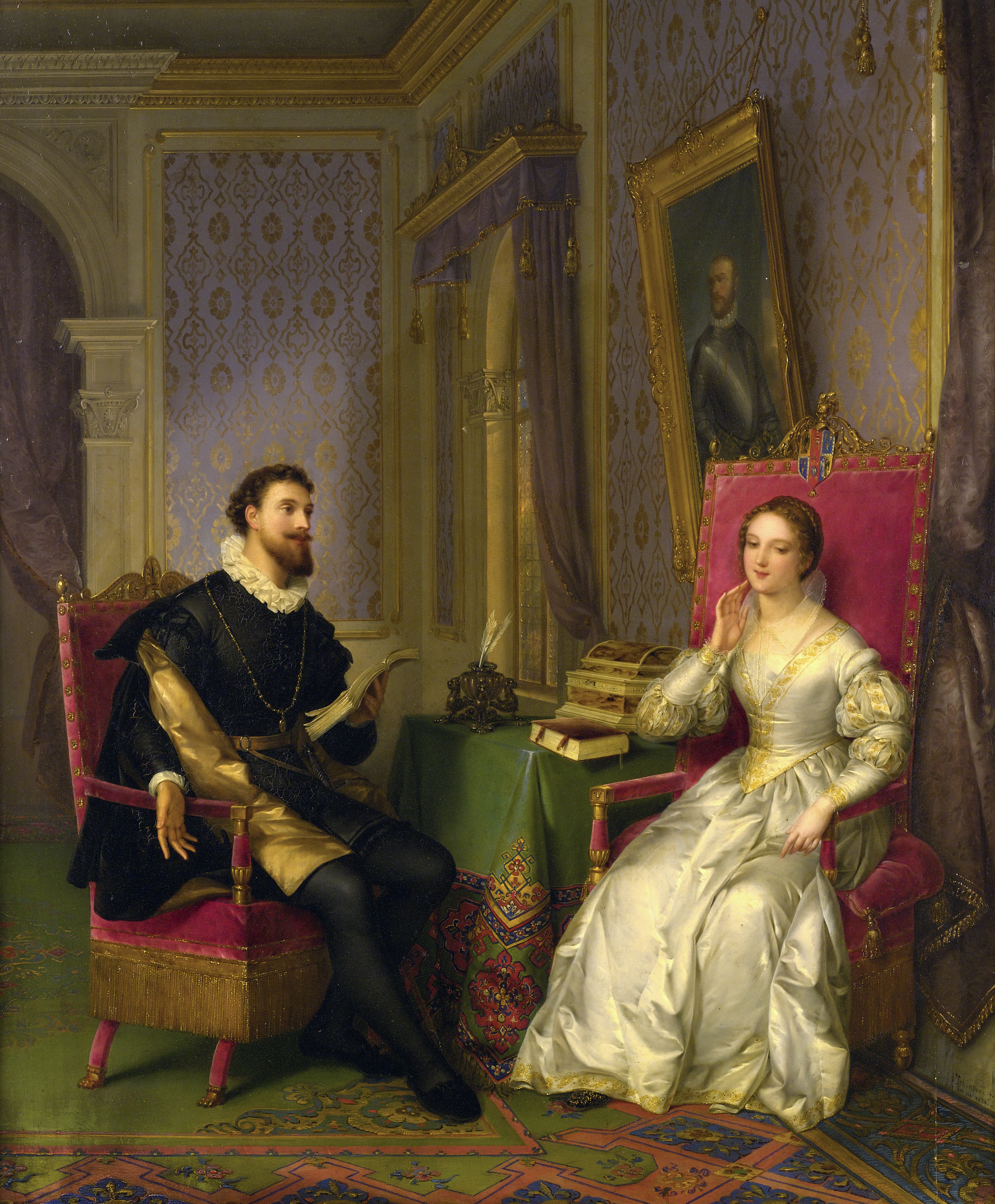 Torquato Tasso and Leonora d'Este.